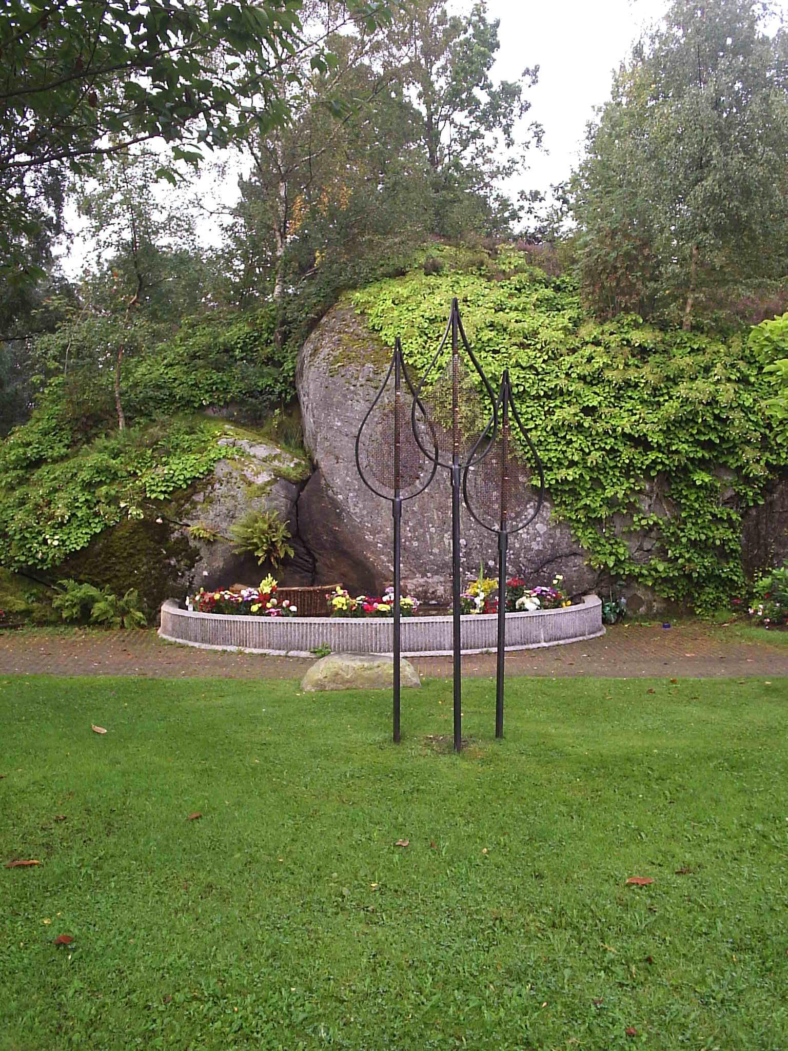 svenska:Ett konstverk i järnsmide - "Tre lågor" - av Torolf Engström, det finns i Göteborgs första minneslund från 1966, dvs på Kvibergs kyrkogård. En bild fotograferad den 7 september 2005 av Harri Blomberg. english:a sculpture by Torolf Engström 1966, located in a grave yard in Gothenburg.